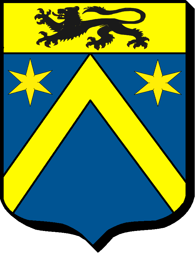 d'azur au chevron d'or, accompagné de deux étoiles de six pointes, au chef d'or chargé d'un lion léopardé de sable.